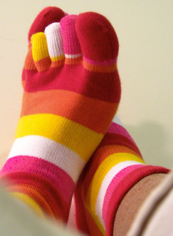 Je suis prête pour l'hiver, mes pieds au chaud dans mes superbes chaussettes.. Un peu de couleur dans ma vie..